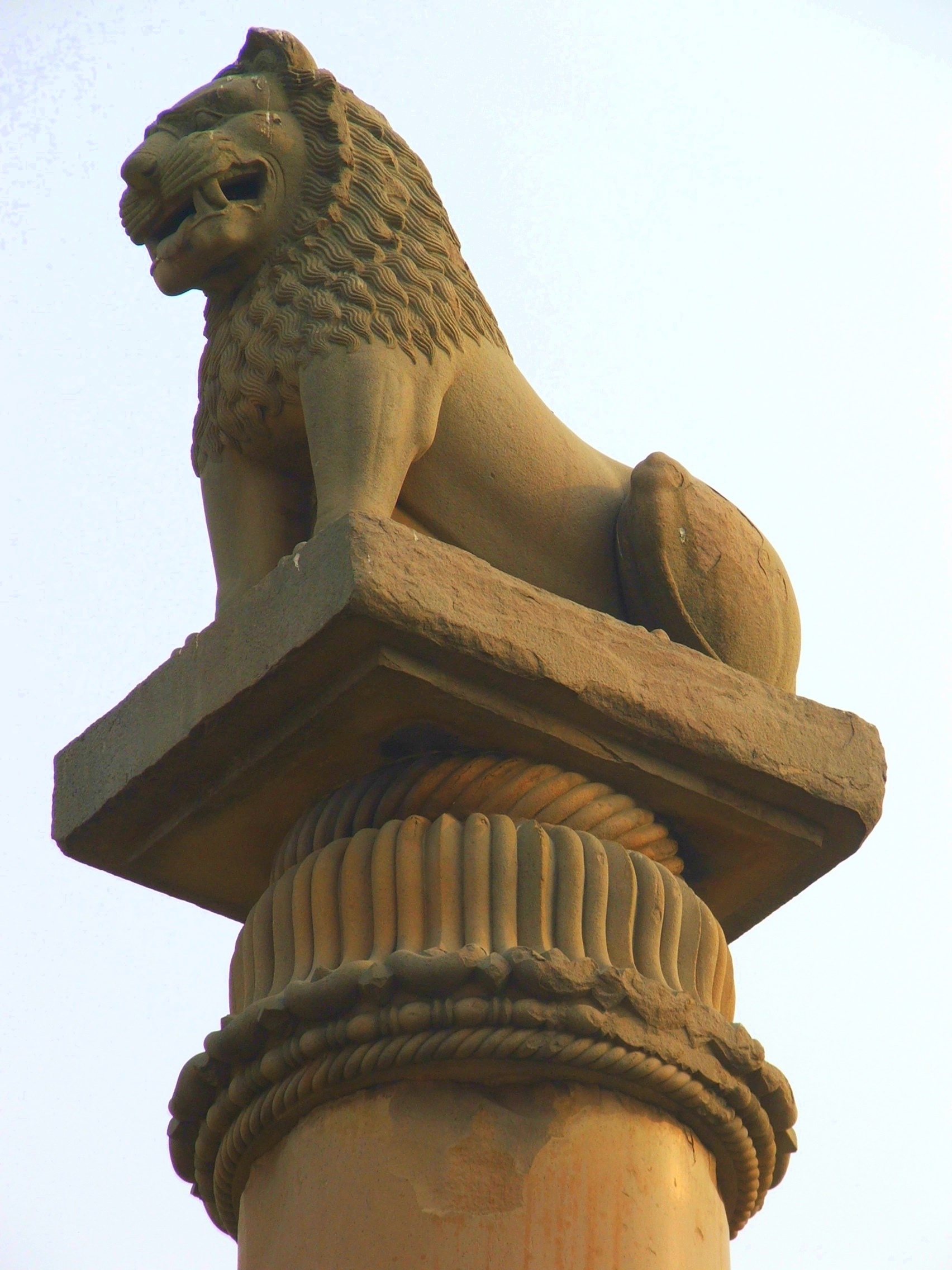 Asokan pillar at Vaishali, Bihar, India